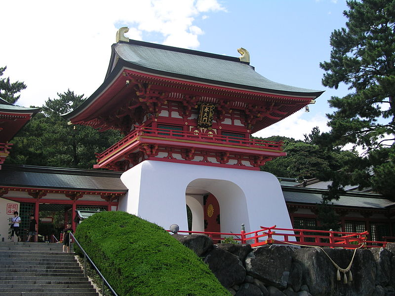 아카마 신궁 정문